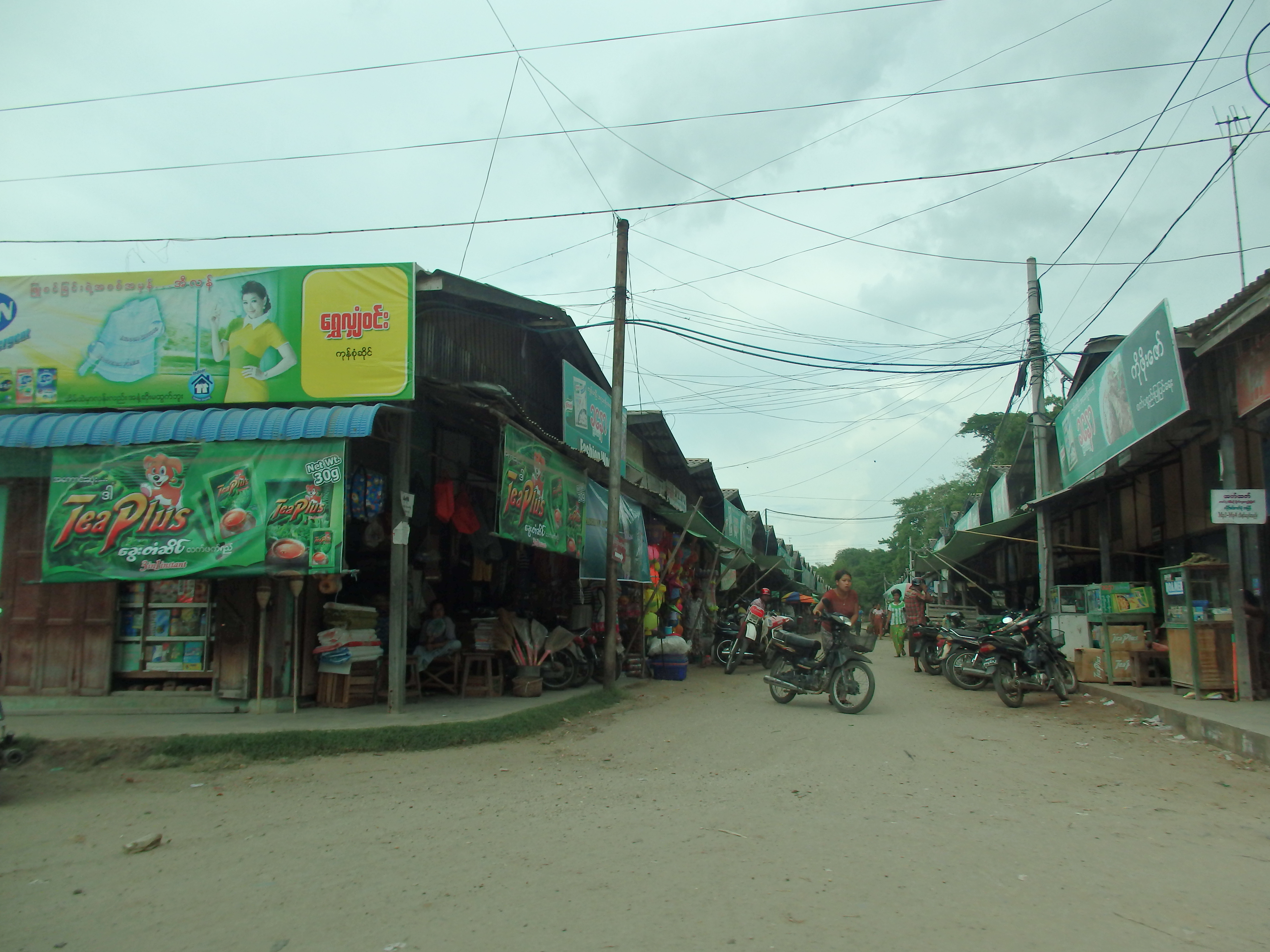 Nyaung-U, Myanmar (Burma)